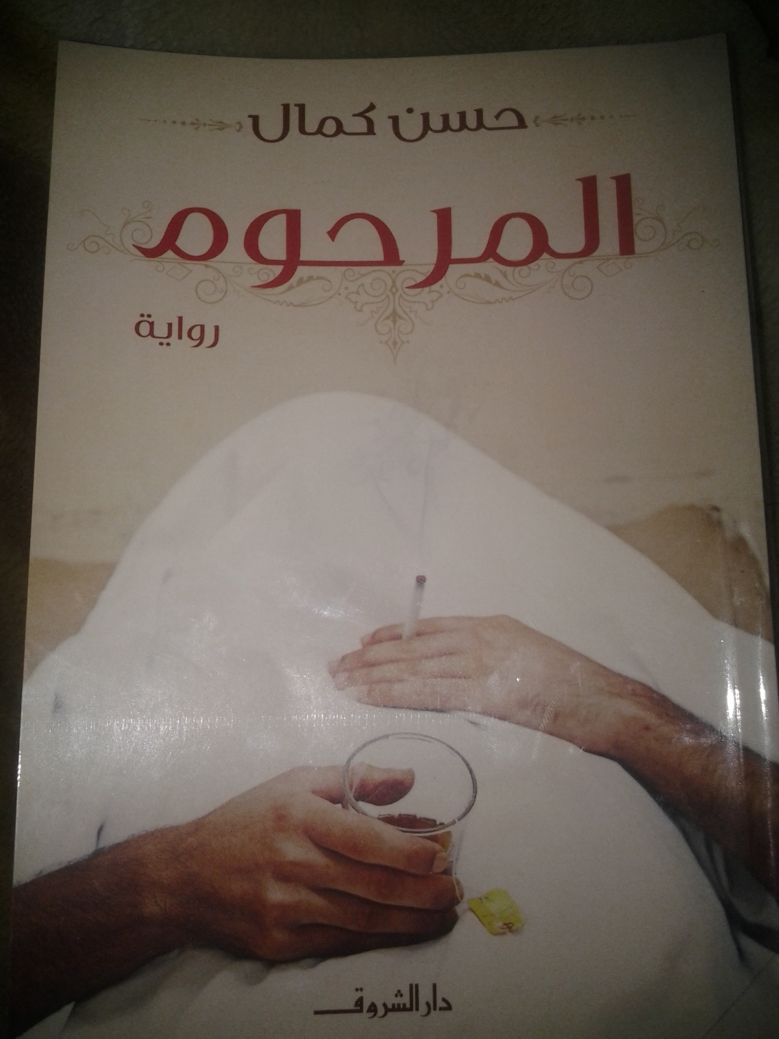 رواية المرحوم